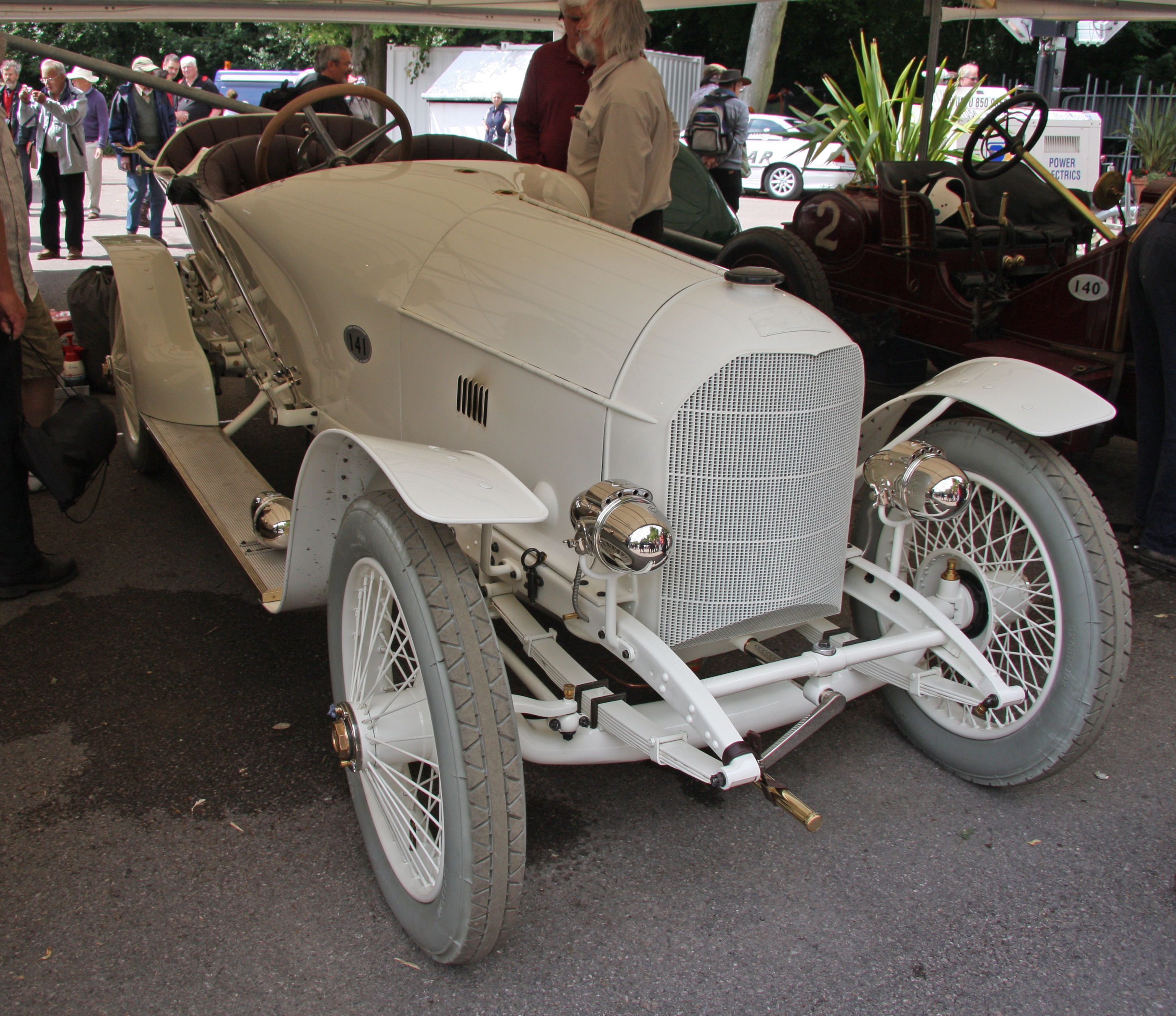 Built 1910. 5,7 litre 4 cylinder